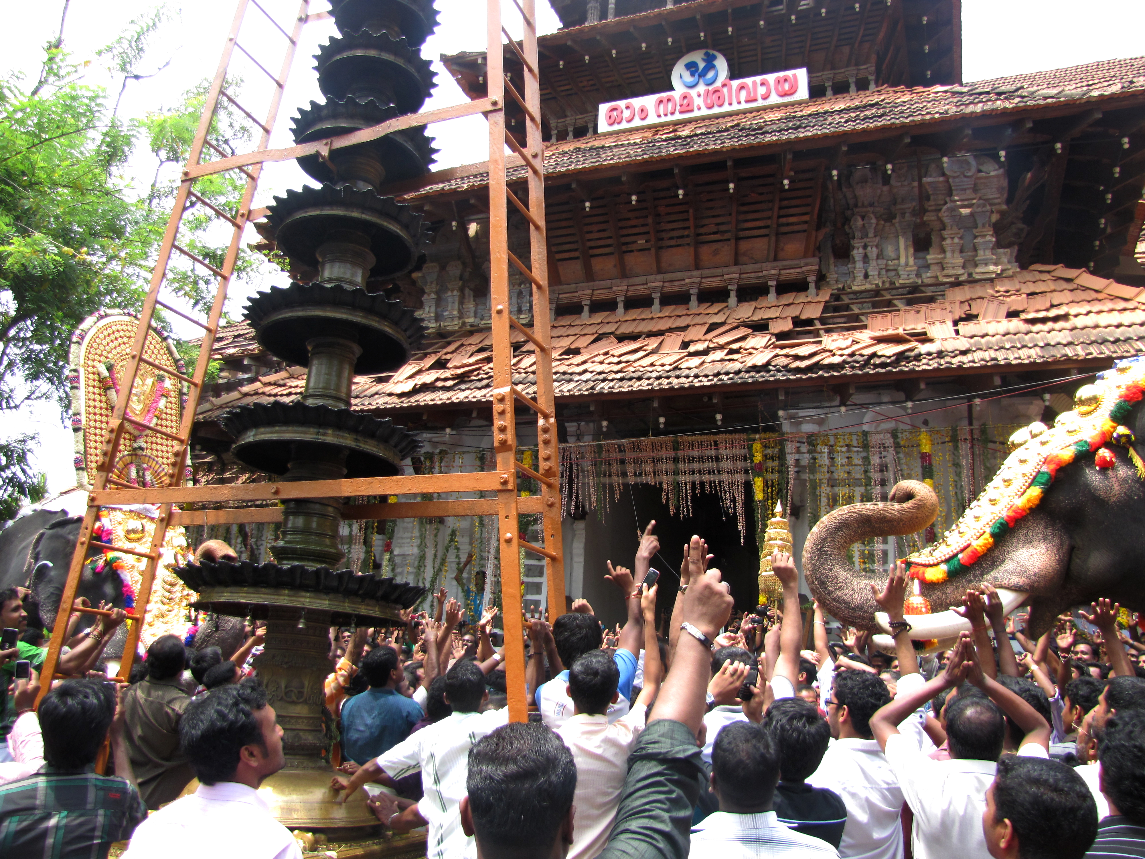 ഒരു തൃശ്ശൂക്കാരന്റെ പൂരക്കാഴ്ചകൾ © മനോജ്.കെ